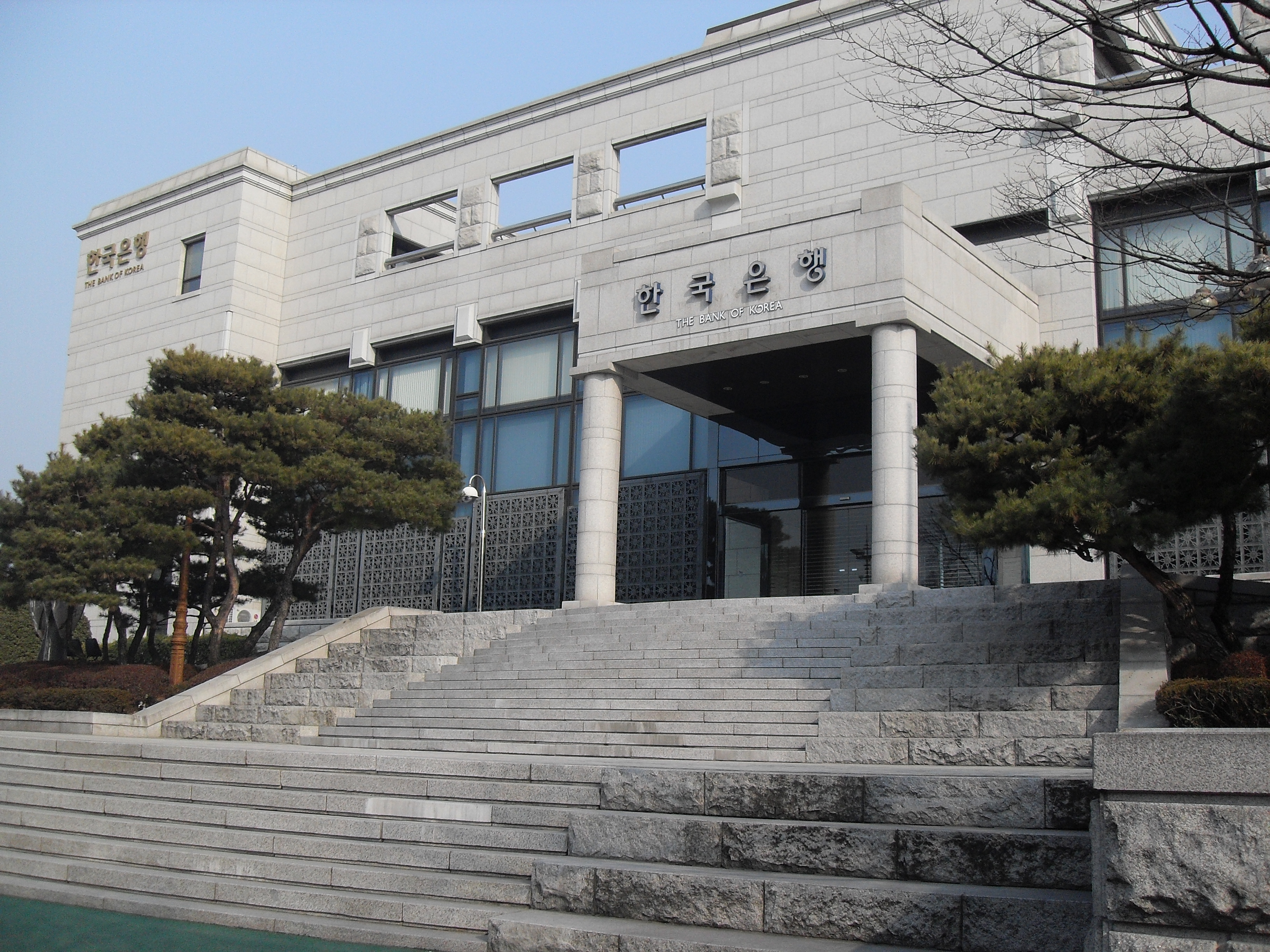 한국은행 창원지점.